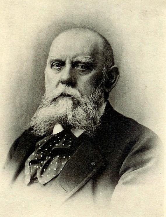 Geoffroy Velten, Alsace, Marseille, brasseur, sénateur